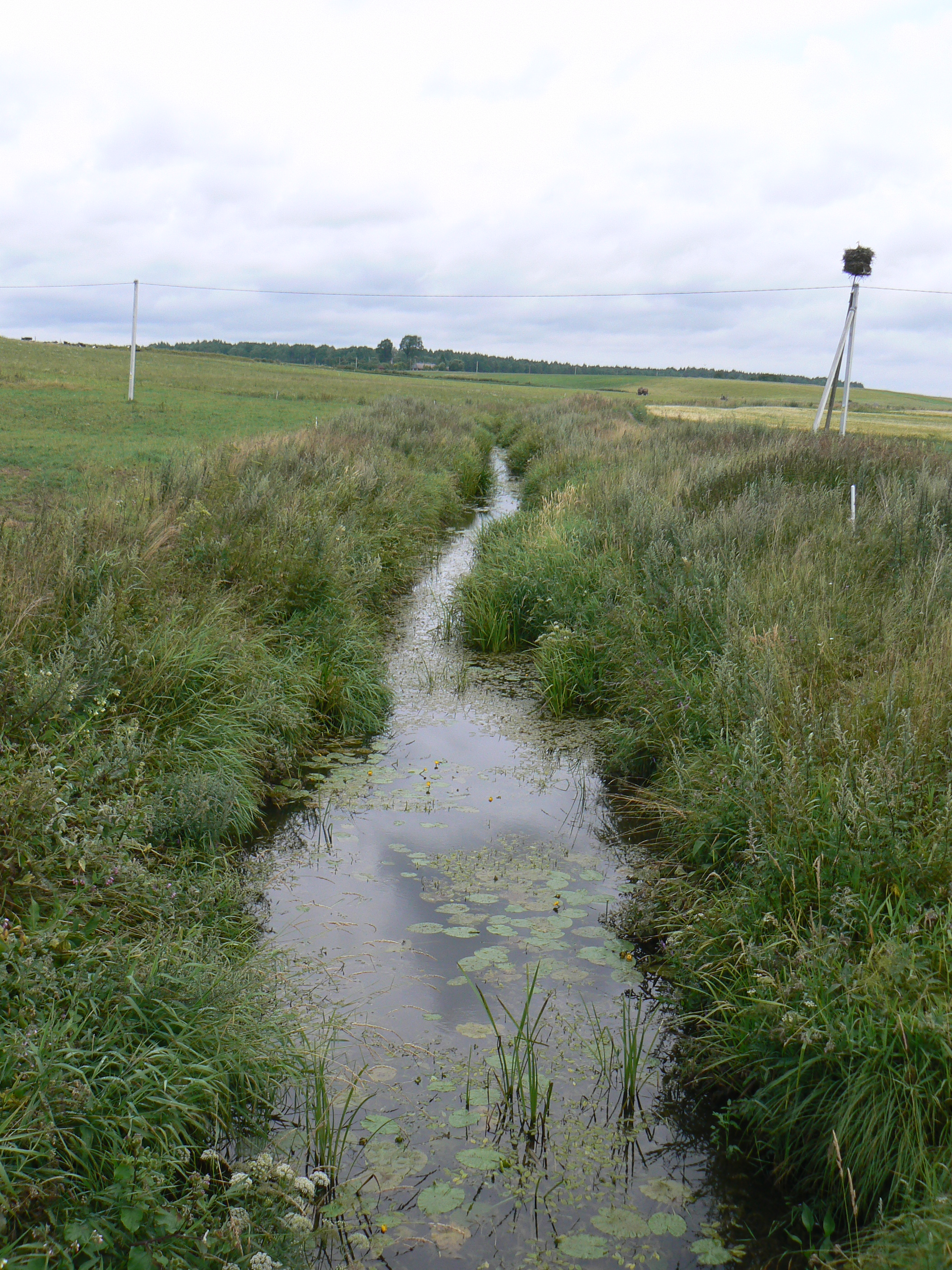 Pravý přítok Akmeny Šlaveita z ulice Dvaro g., Šlaveitai. Pohled po proudu, t.j. k jihovýchodu